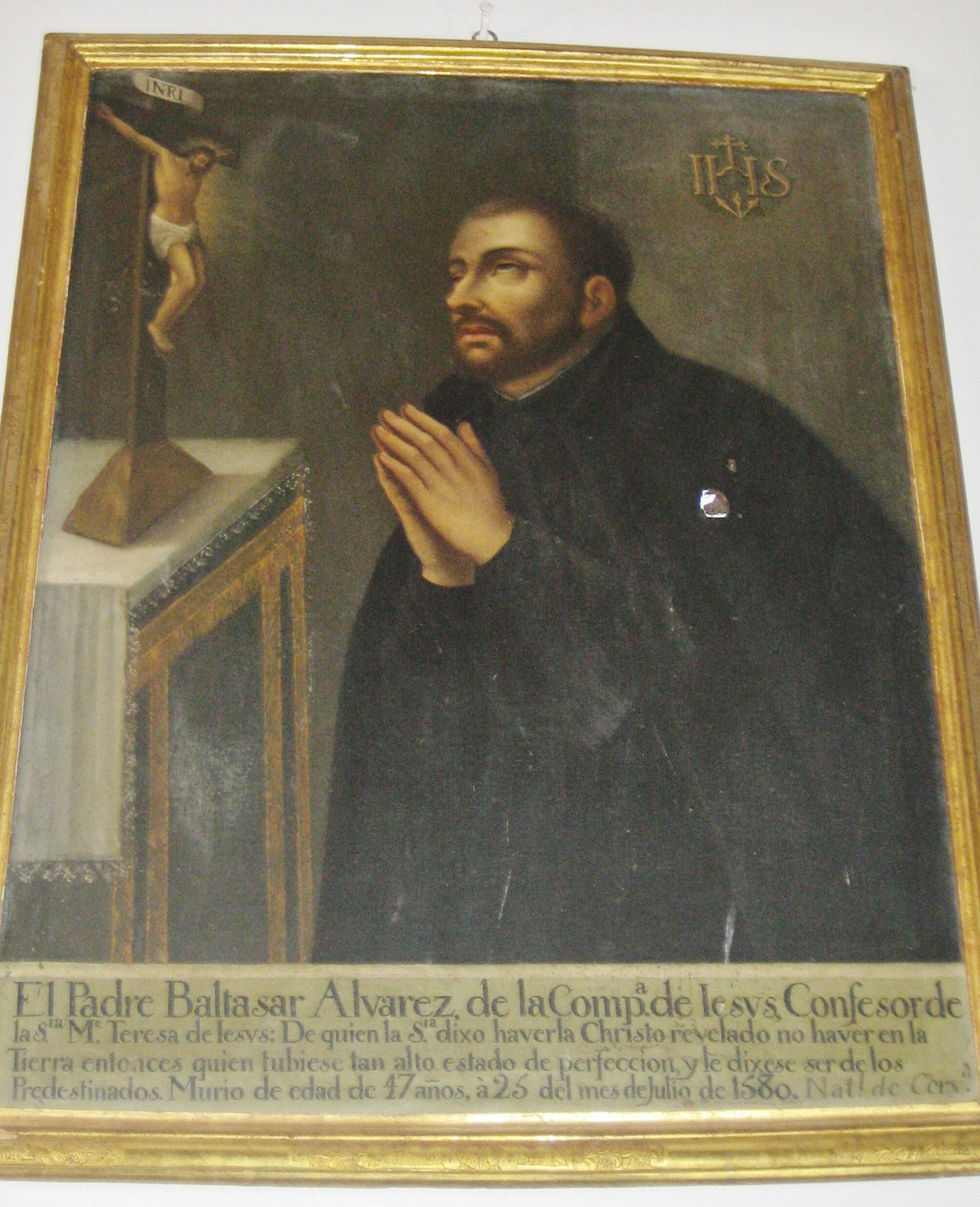 Cuadro del Padre Baltasar Álvarez. Sacristía de la Iglesia Parroquial de San Gil, Cervera del Río Alhama (La Rioja), pueblo natal del Padre Baltasar Álvarez.